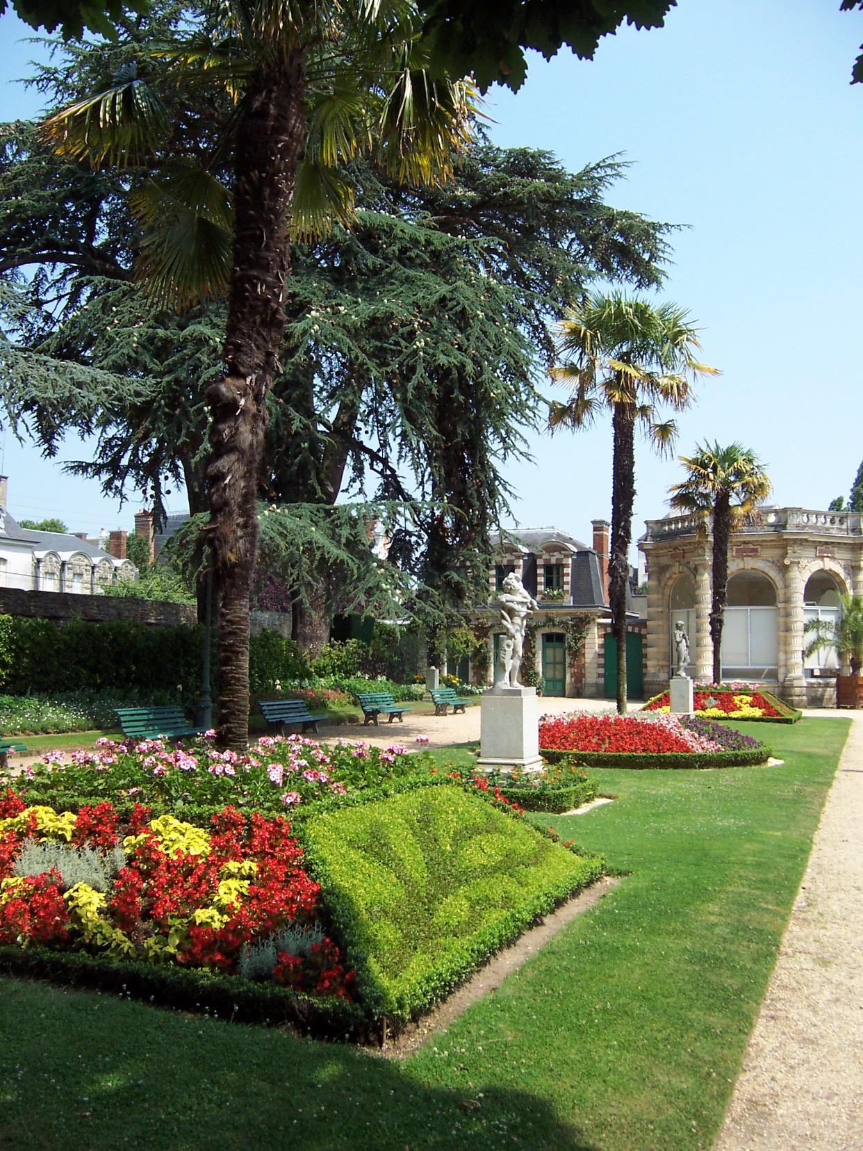 Massifs de fleurs au parc Thabor